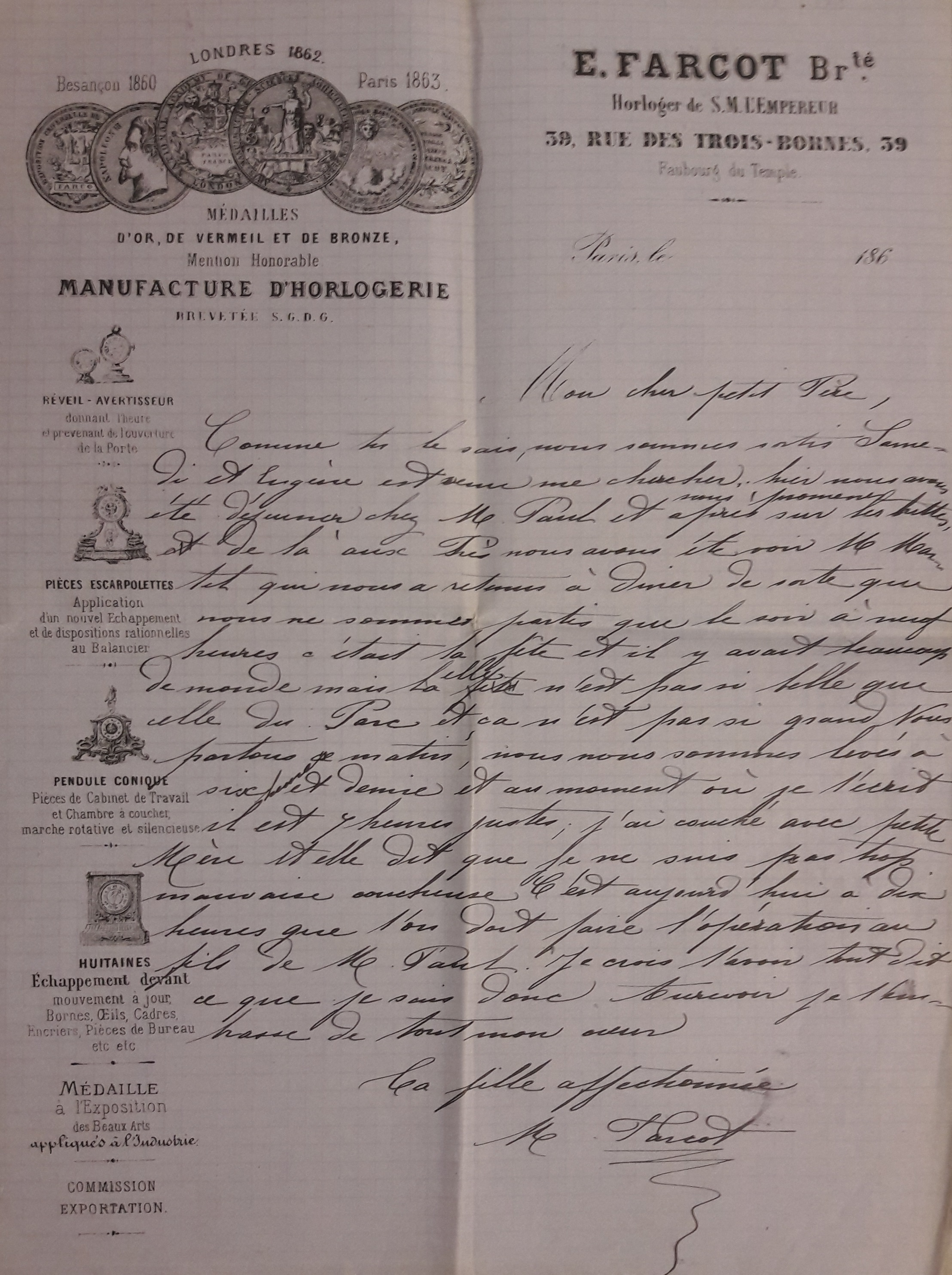 Différentes médailles obtenues par Farcot et quelques brevets mentionnés sur la facture